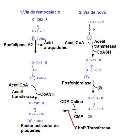 Síntesi PAF